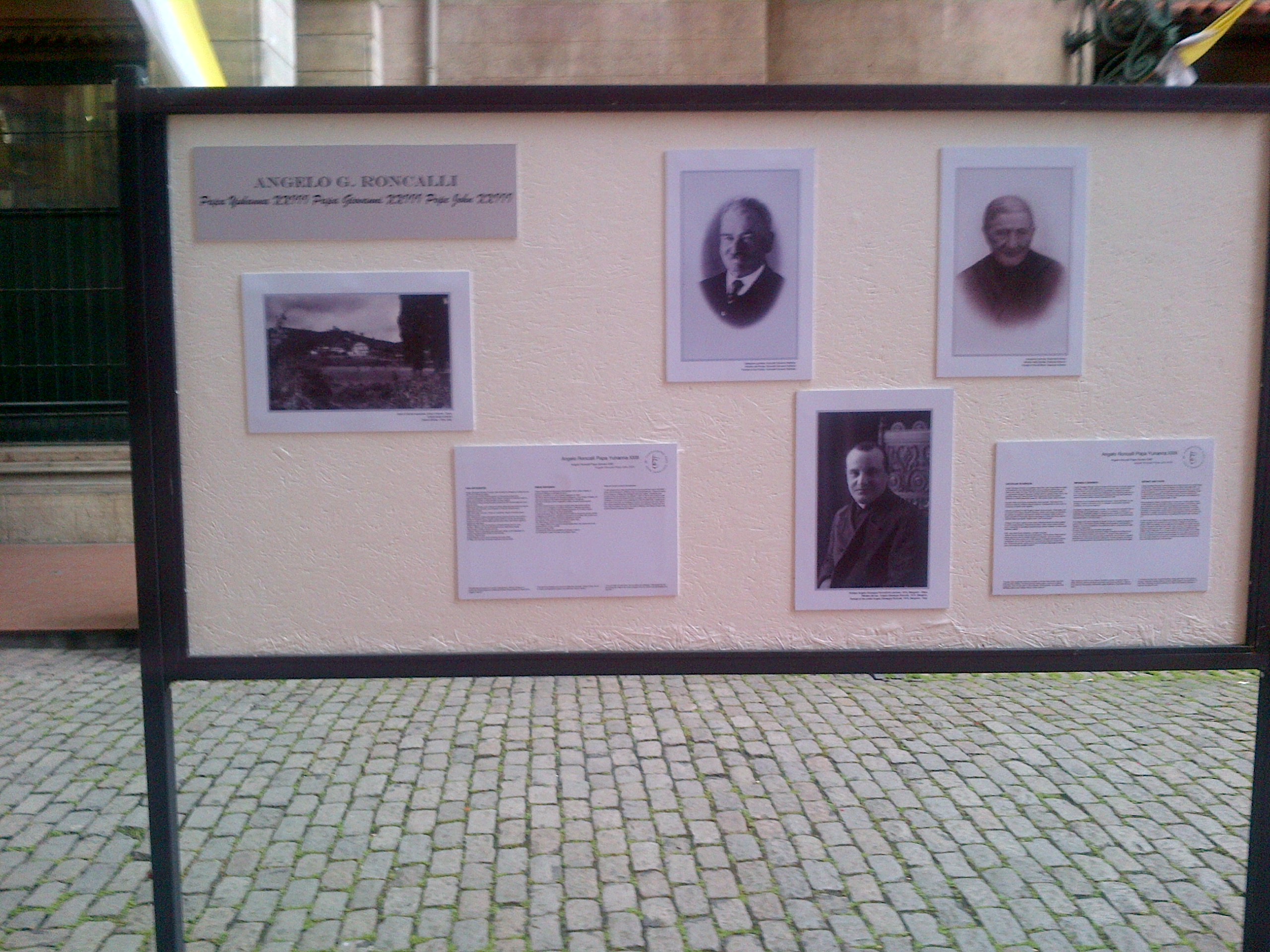 Una exposicion de fotos al recuerdo de Juan XXIII en Estambul, Turquia, en junio de 2014. Juan XXIII sirvio en Estambul también.